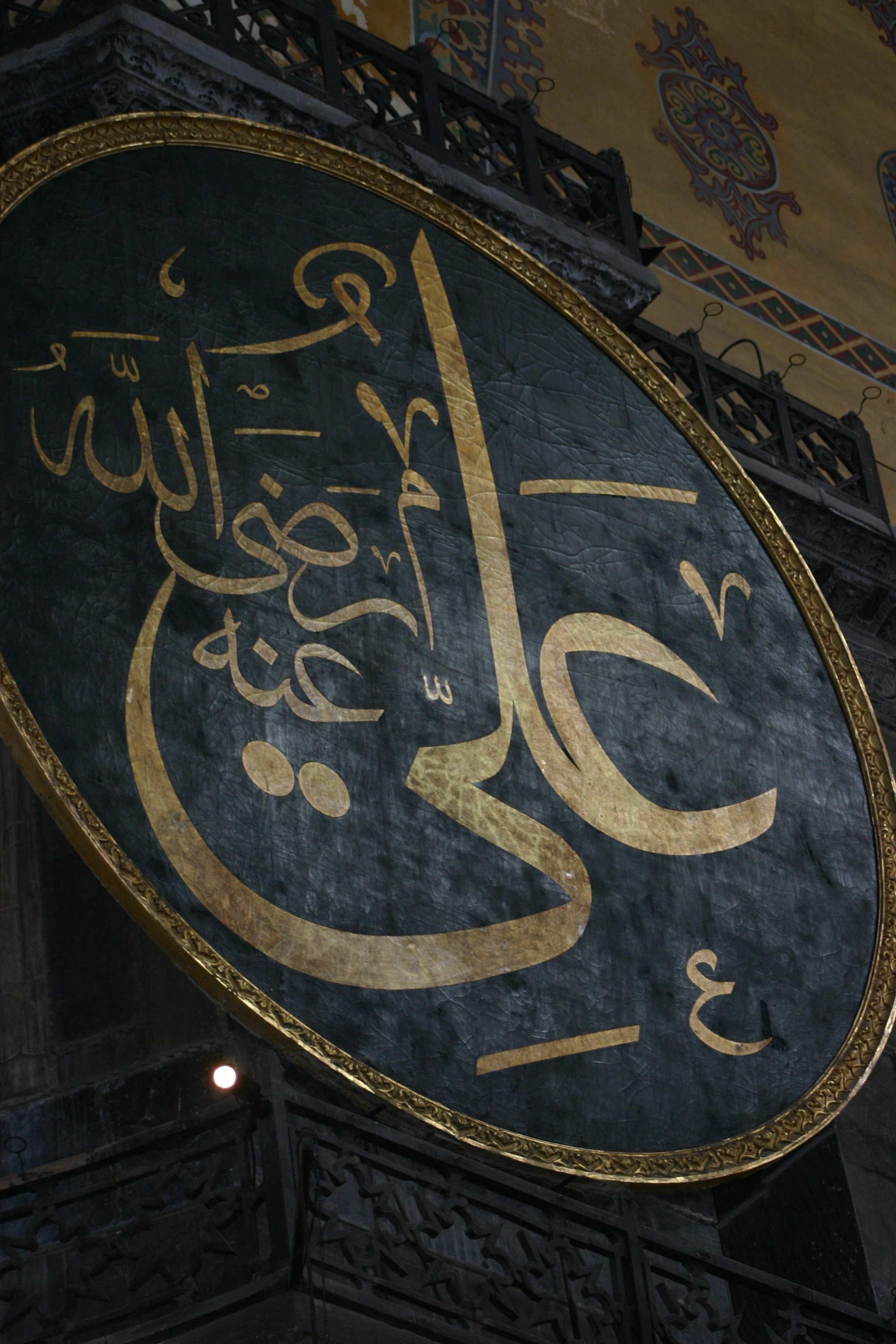 Selo caligráfico em árabe em Hagia Sophia